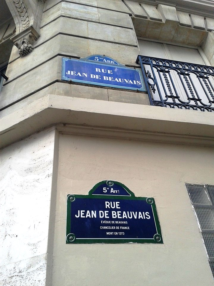 Under högmedeltiden hade studenter från Skara stift ett härbärge vid namn Domus Scarensis på denna gata, beläget på in vico Brunelli 4 nuvarande Rue Saint Jean de Beauvais, mellan College de France och Boulevard Saint Germain i Quartier Latin.